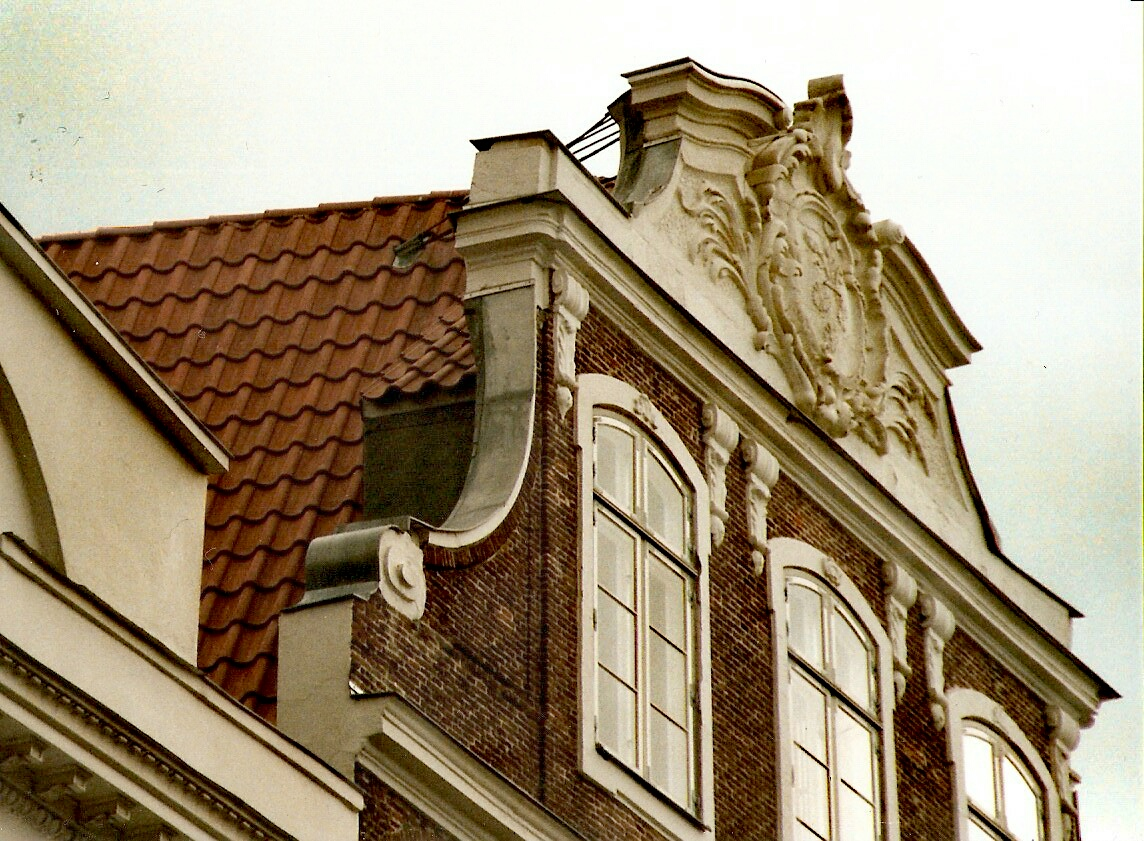 Das Robert’sches Haus, Detail: Dach